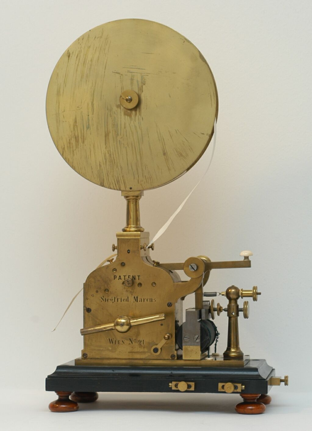 Telegraphen - Reliefschreiber, konstruiert von Siegfried Marcus, Wien, 1861, Quelle: Museum f. Post und Kommunikation, Frankfurt am Main